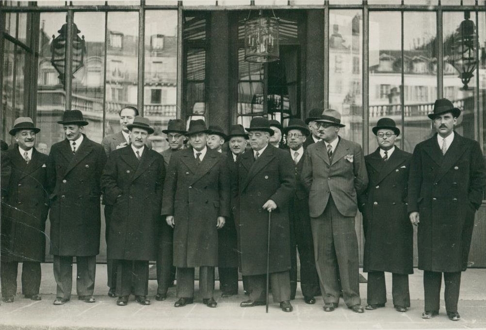 Gouvernement Édouard Daladier avril 1938